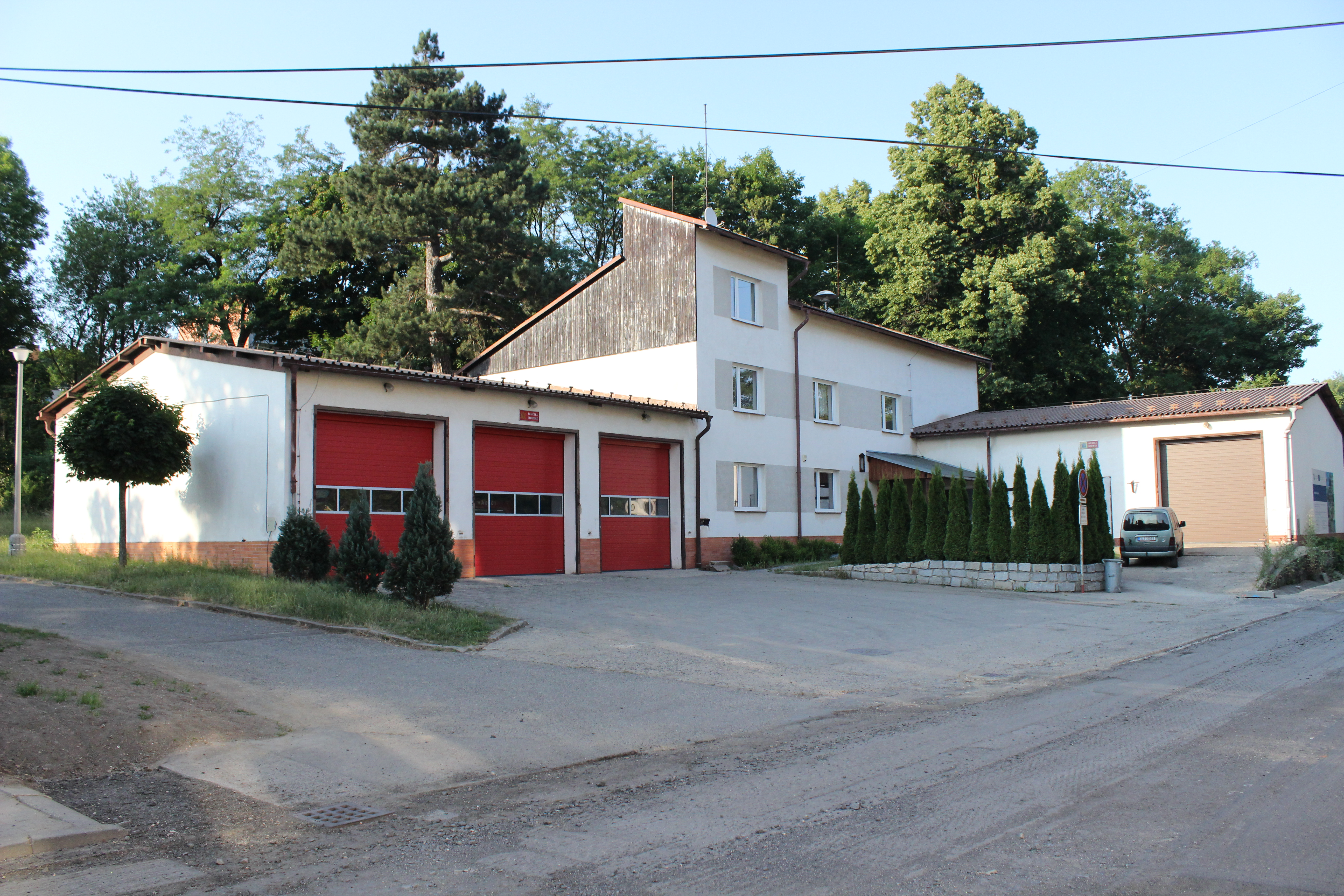 Hasičská zbrojnice v Hejnicích v okrese Liberec.